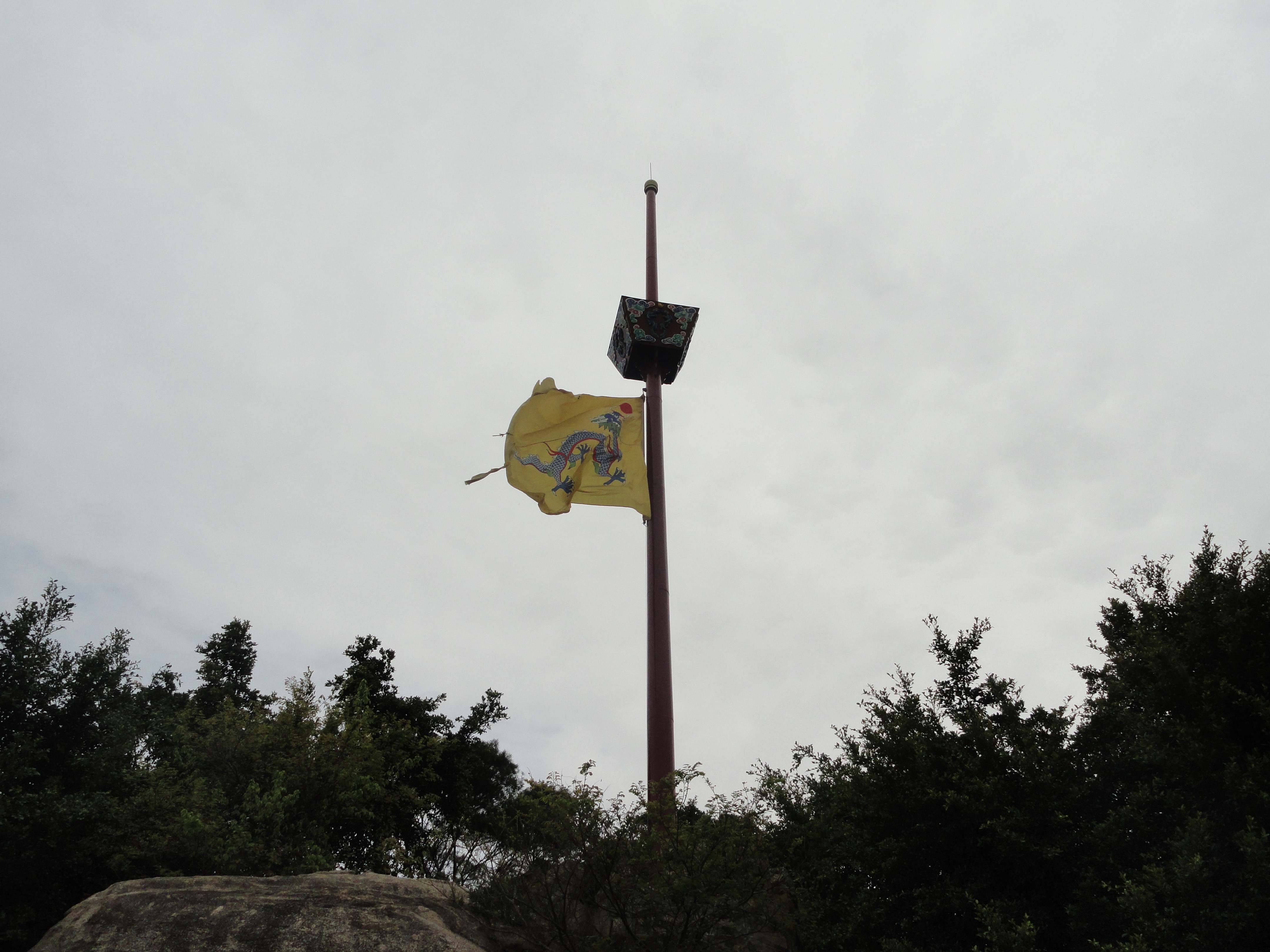 中文（中国大陆）: 悬挂在厦门胡里山炮台的黄龙旗（大清帝国国旗）